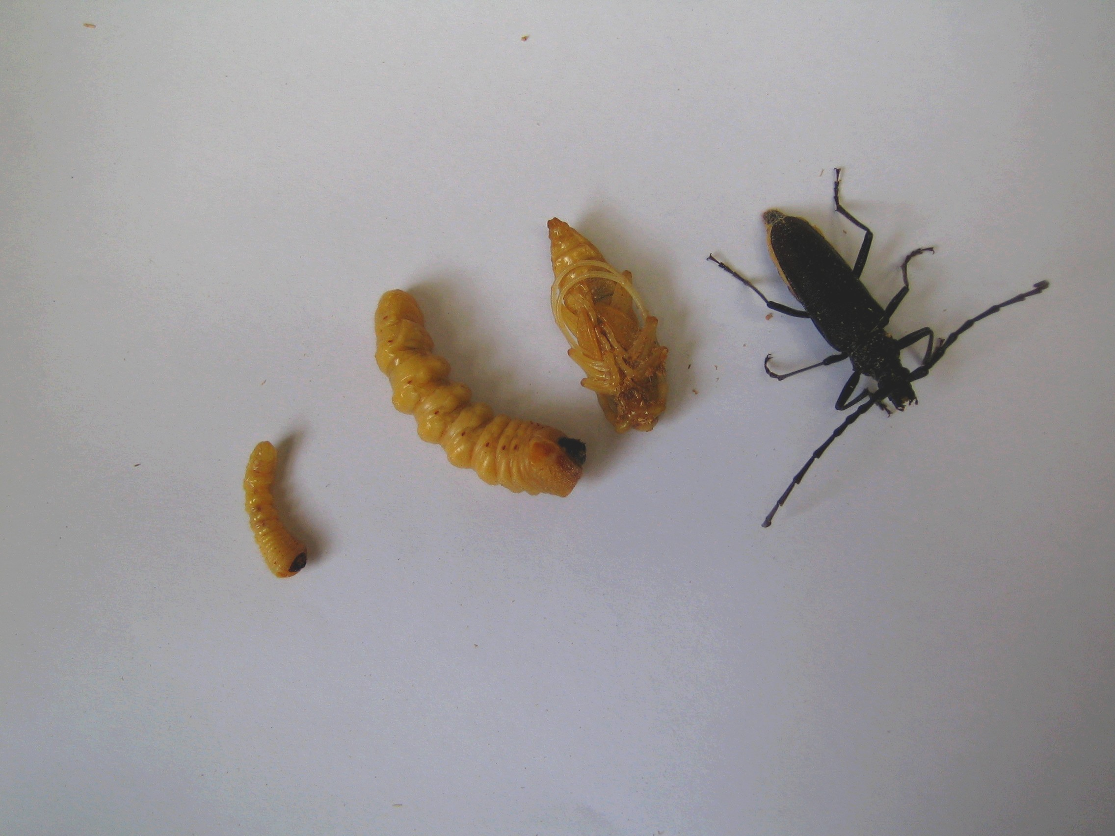 Der Eichenbock in vier unterschiedlichen Entwicklungsstadien.